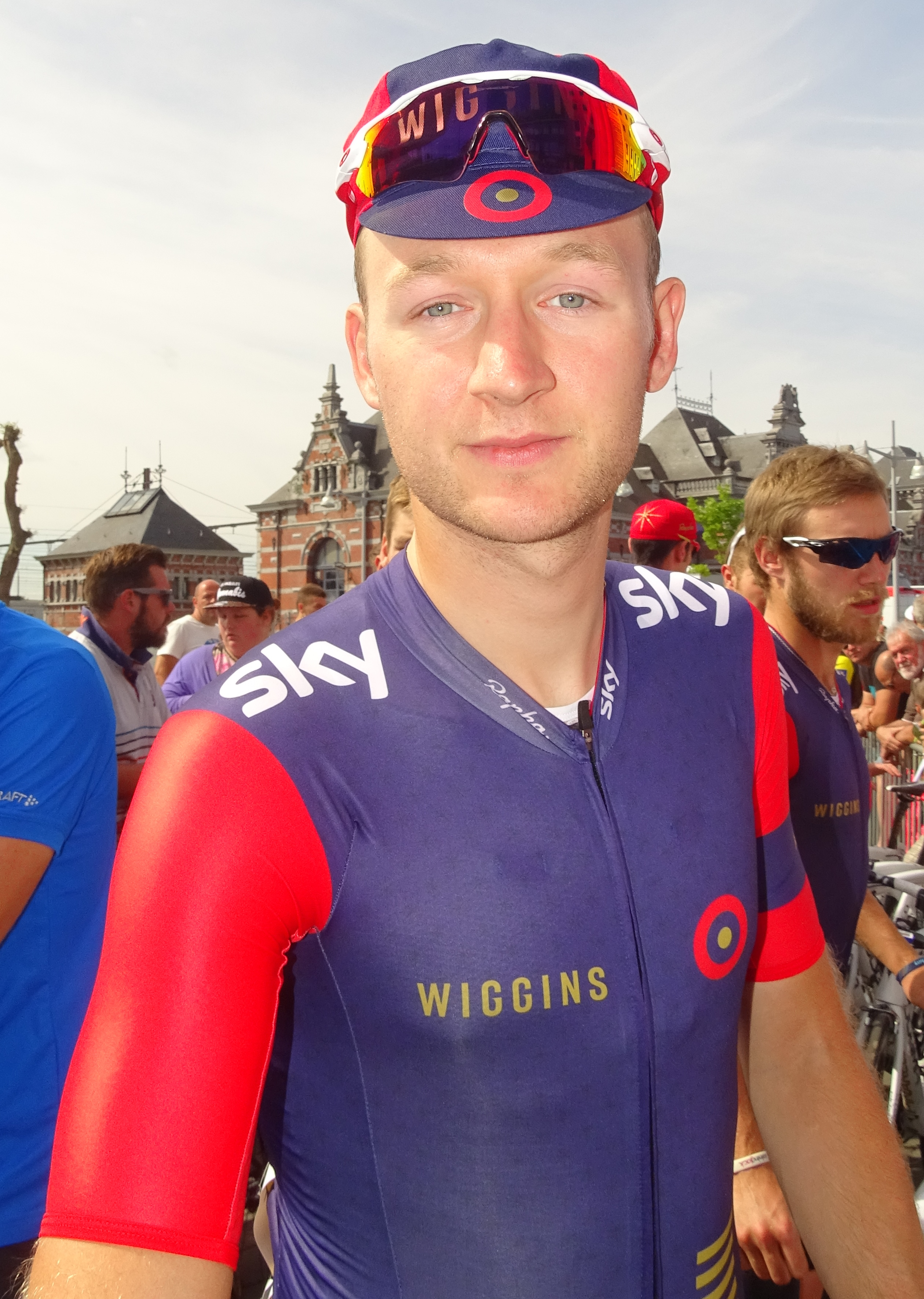 Reportage réalisé le mercredi 22 juillet à l'occasion du départ du Grand Prix Pino Cerami 2015 à Saint-Ghislain, Belgique.